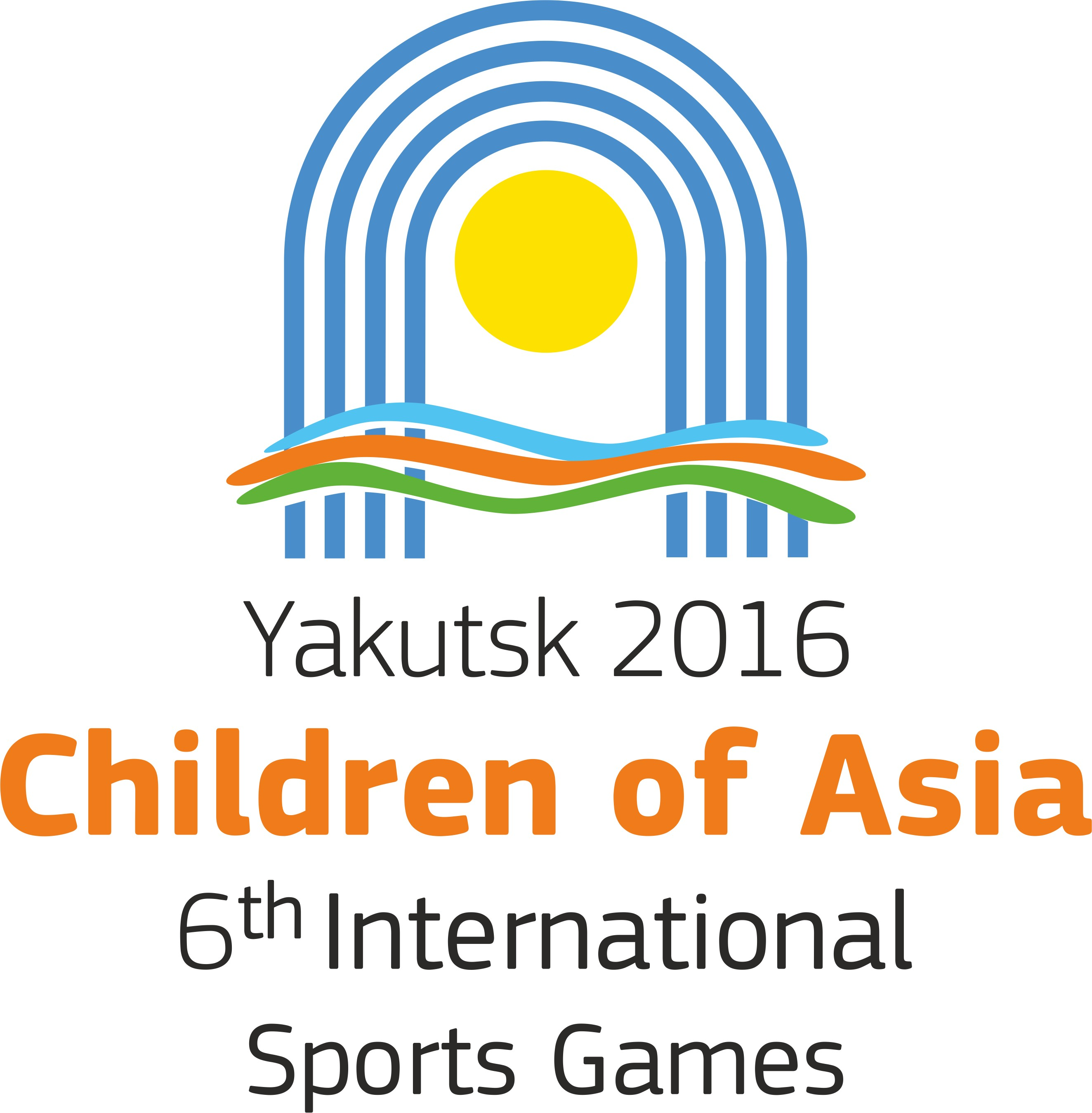 Эмблема VI Международных спортивных игр "Дети Азии"